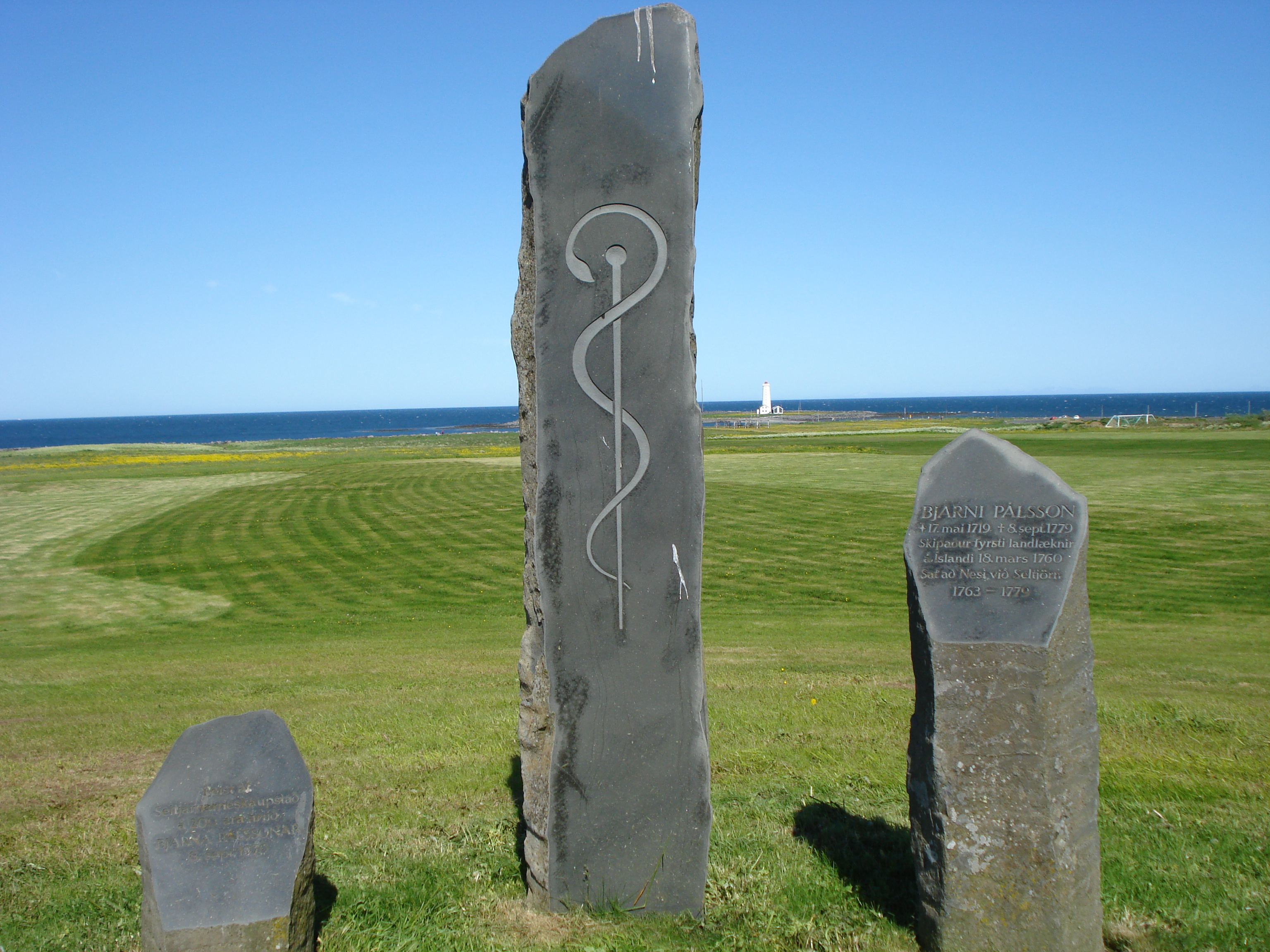 Bjarni Pálsson, * 17.5.1719 + 8.9.1779, skipaður fyrsti landlæknir 18.3.1760. Sat að Nesi við Seltjörn, 1763-1779